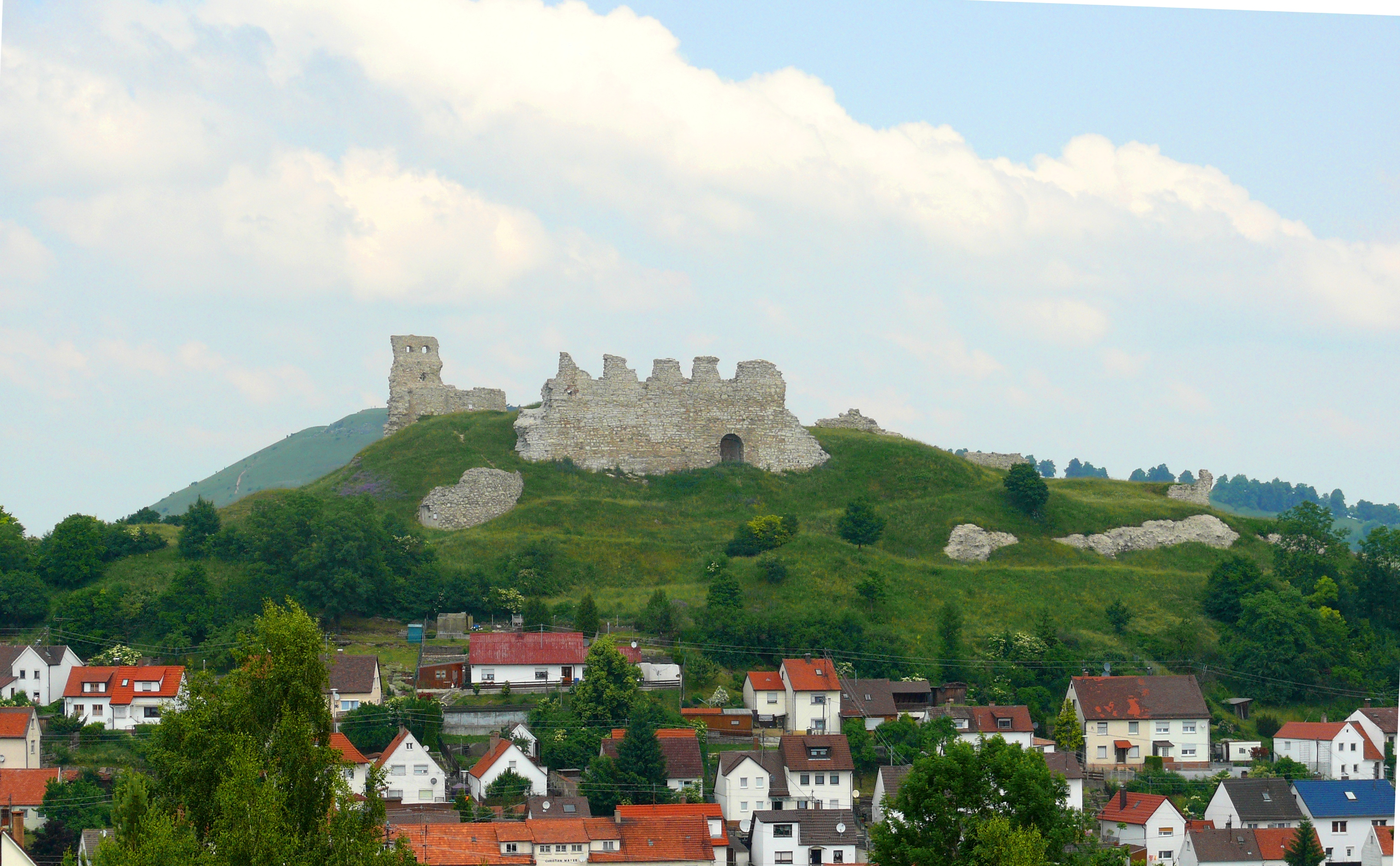 Blick von Süden zur Ruine Flochberg